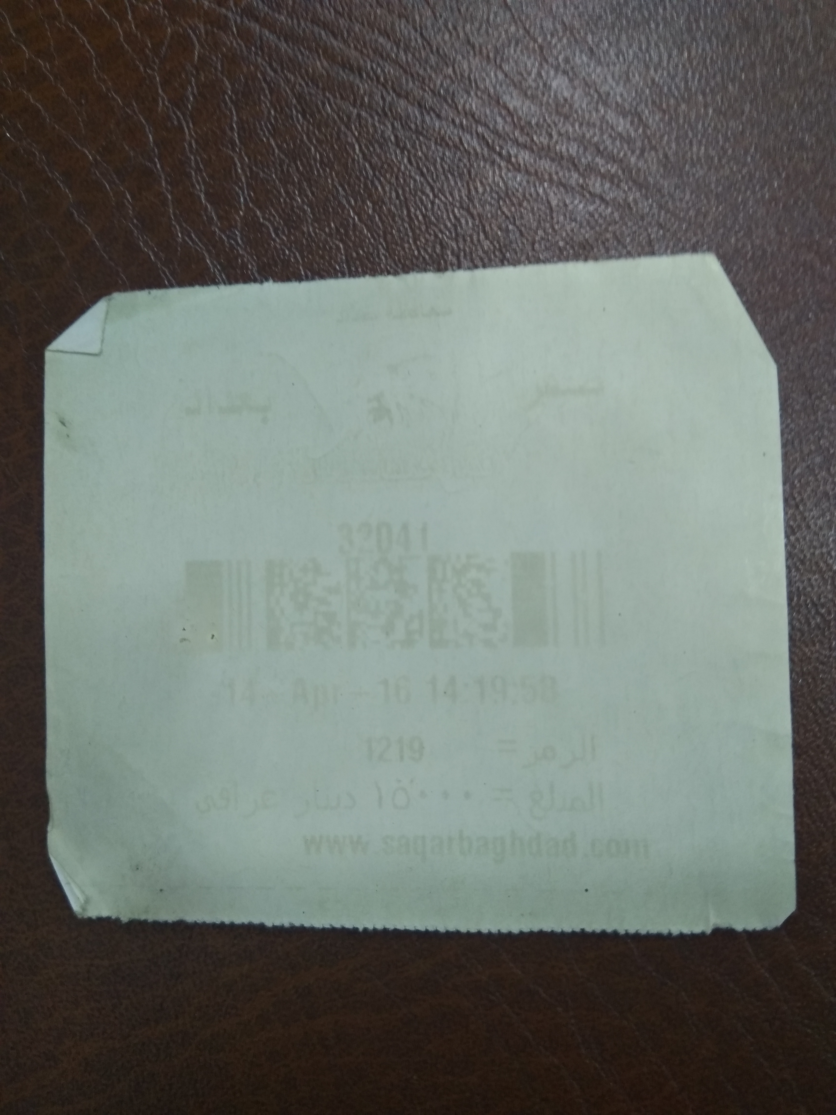 Saqr Baghdad receipt